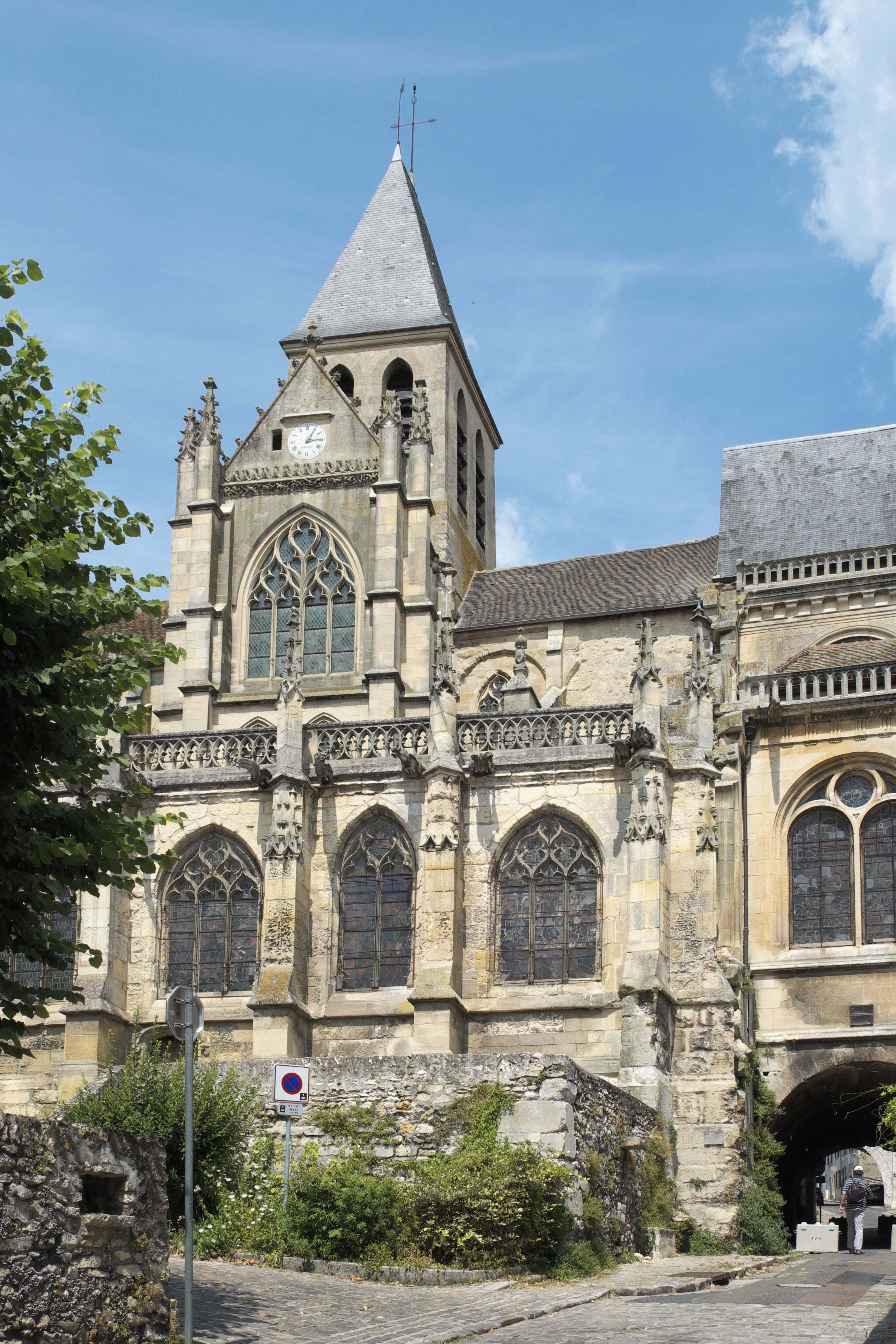 Katholische Pfarrkirche Saint-Martin in Triel-sur-Seine im Département Yvelines (Île-de-France/Frankreich), Südfassade